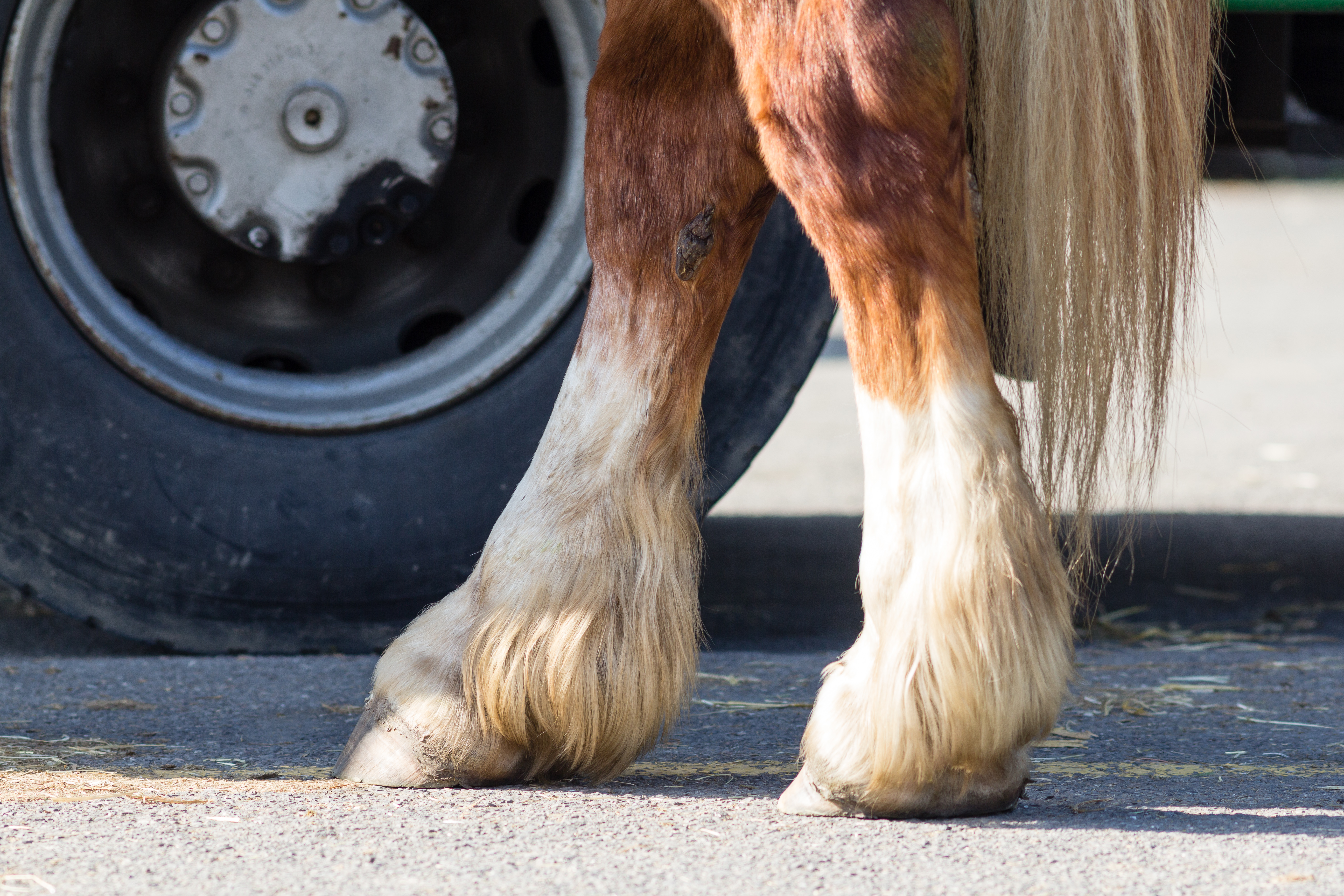 Édition 2016 du concours national d'attelage Élite de Rennes.